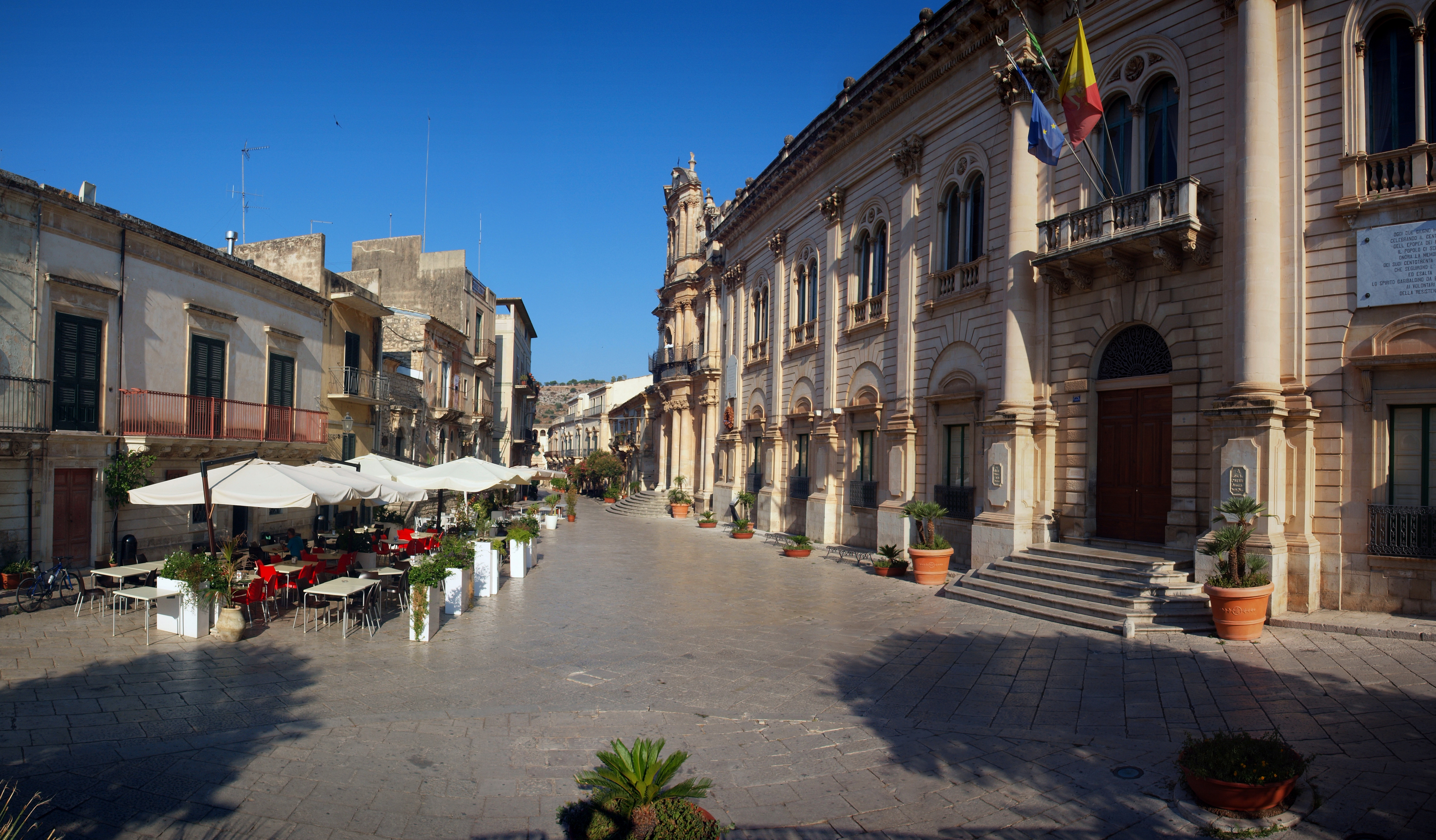 Via F.M. Penna This is a photo of a monument which is part of cultural heritage of Italy.